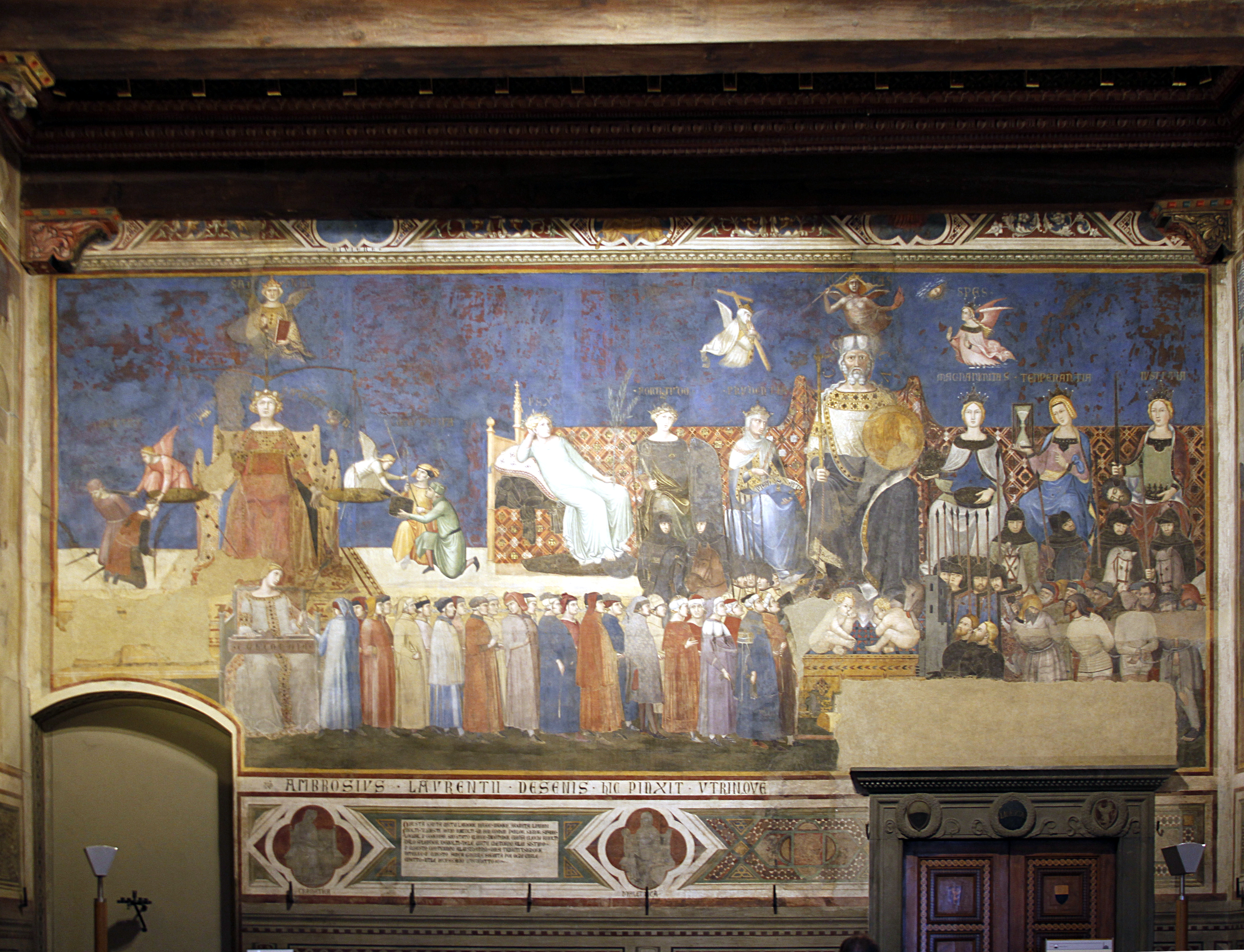 Palazzo Pubblico - Siena